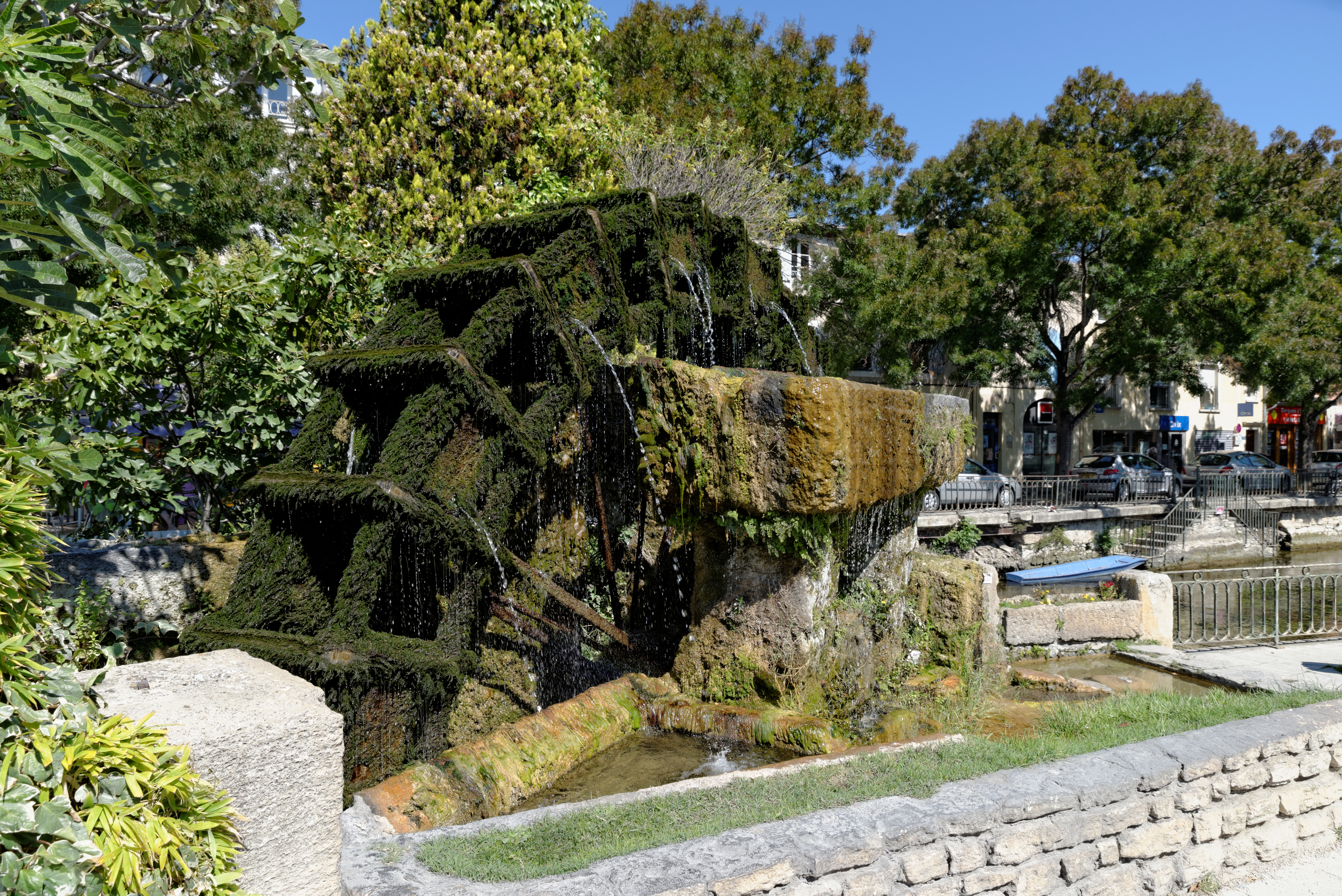 Roue à aubes, L'Isle-sur-la-Sorgue. (Vaucluse, France).